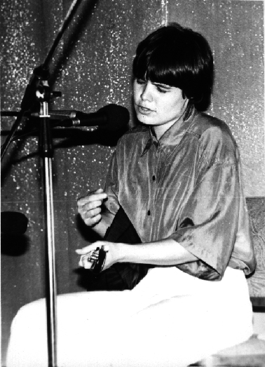 Выступление Светланы Чапуриной